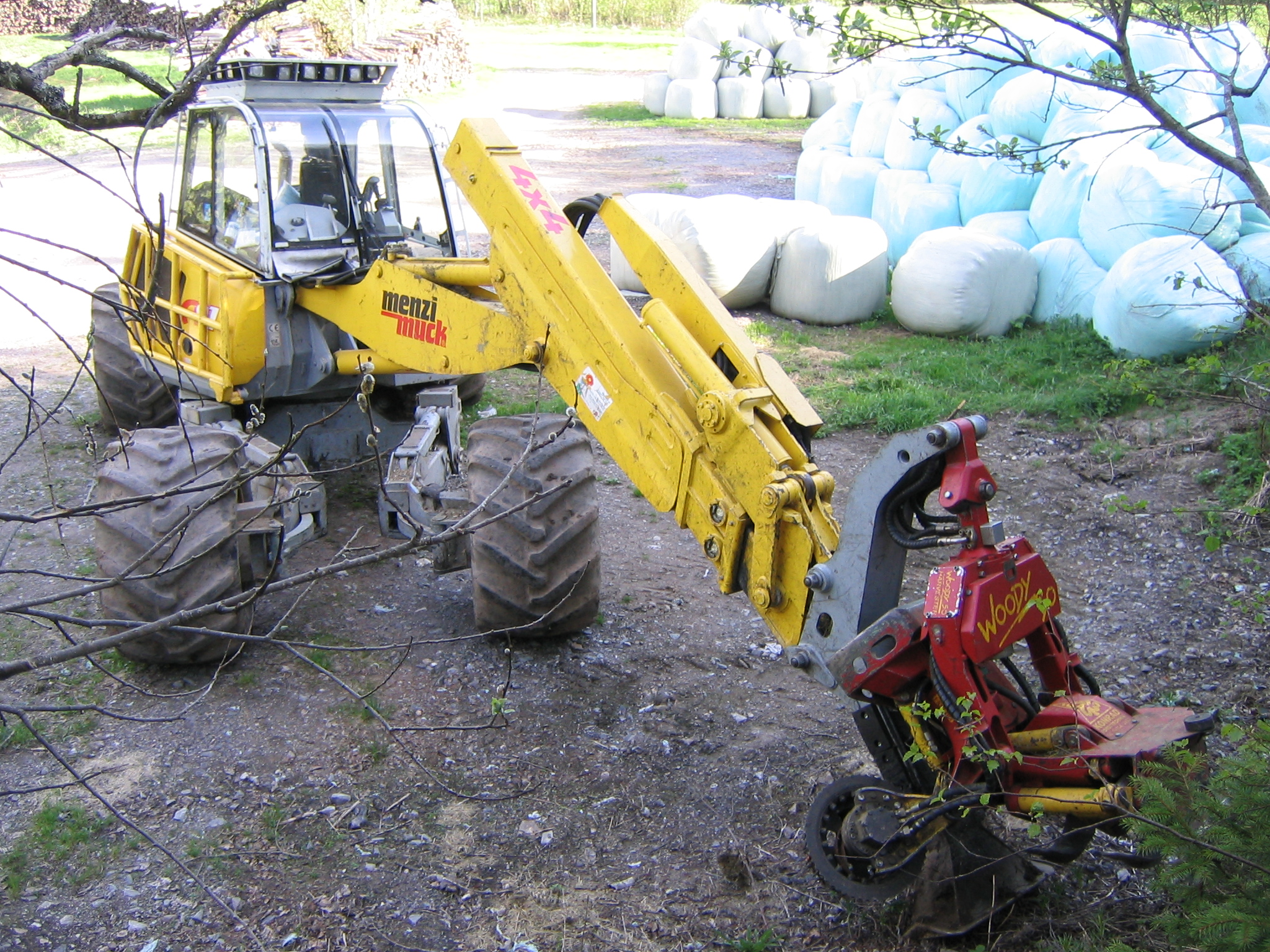 Mobil-Allzweckmaschine Menzi Muck A91 (John-Deere-Vierzylinder-Dieselmotor, 140 PS), Ausstattungsvariante 4x4 Plus mit Forst-Sicherheitskabine und Forstausleger Woody H50 (Woody 50 Harvester) für den Einsatz als Holzvollernter